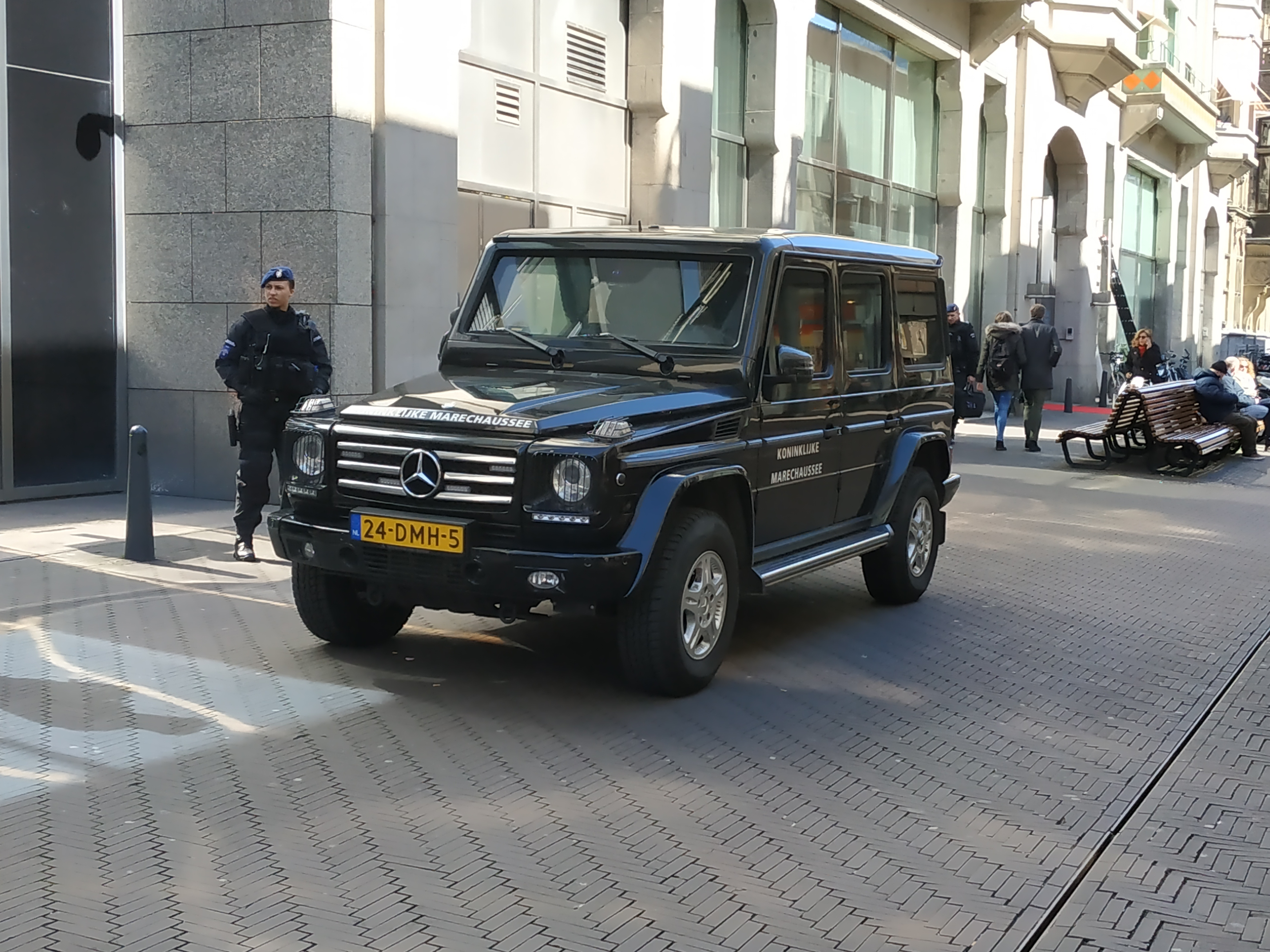 Mercedes-Benz G-Class de la Gendarmerie néerlandaise (Koninklijke marechaussee) à la Haye